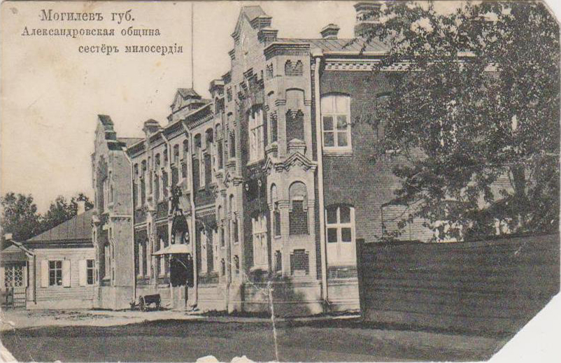 Беларуская (тарашкевіца): Магілёў (Mahiloŭ), вуліца Малая Садовая (vulica Małaja Sadovaja). Будынак Чырвонага крыжа